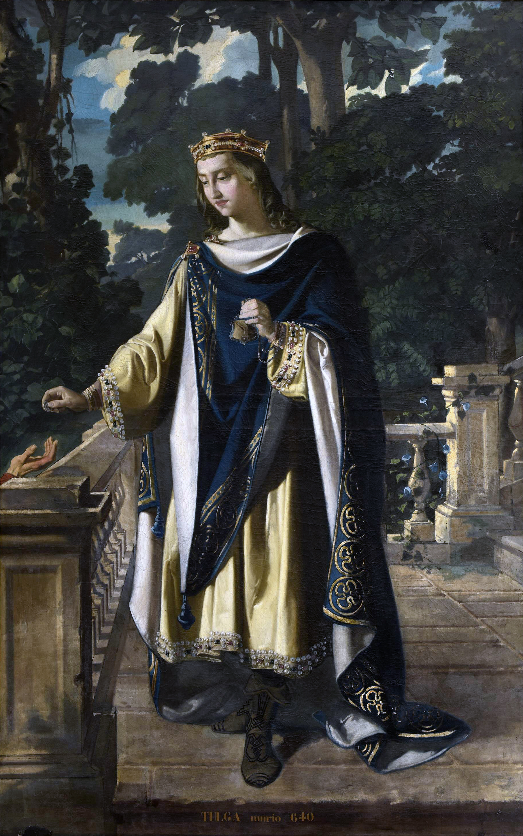 Retrato imaginario de Tulga († 642), rey de los Visigodos e hijo y sucesor del rey Chintila.